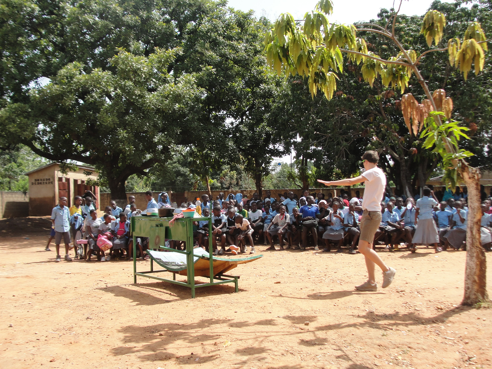 Picture taken in Natitingou (Benin). Cette photo est le résultat de mon volontariat avec l'association Atouts Soleil. L'objectif de cette mission était de sensibiliser les plus jeunes face au problème de la déforestation et de proposer une alternative durable pour cuisiner sans utiliser de bois ni de charbon. This is an image with the theme "Africa on the Move or Transport" from: Benin